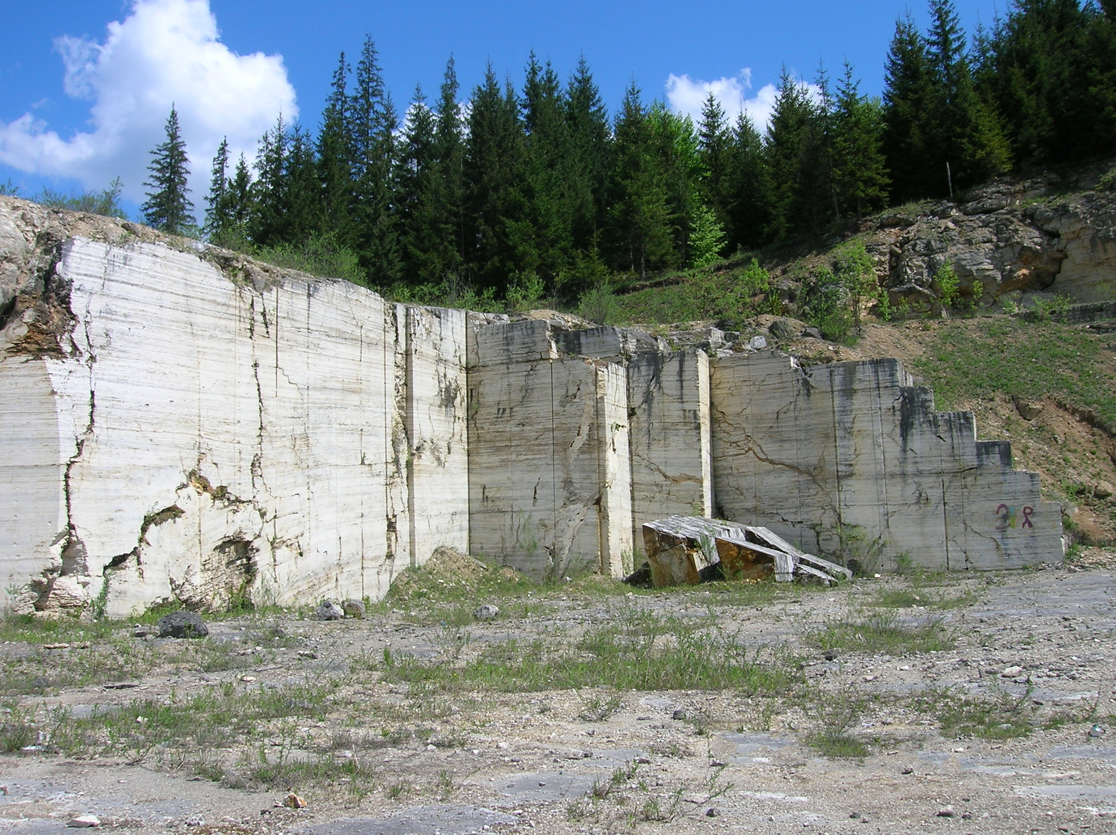 Carieră de travertin din Rezervaţia Scaunul Rotund